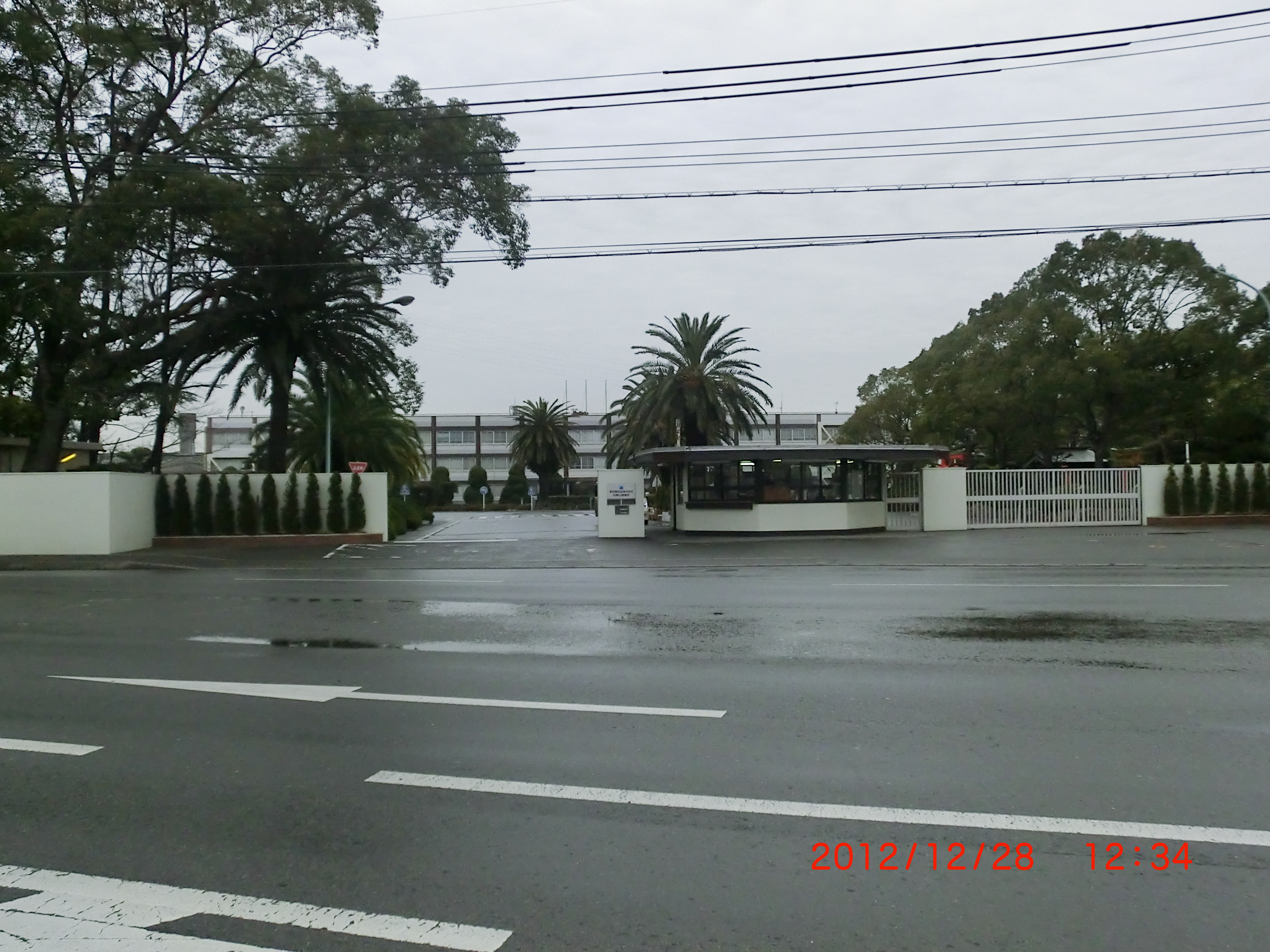 日鐵住金和歌山製鉄所正門